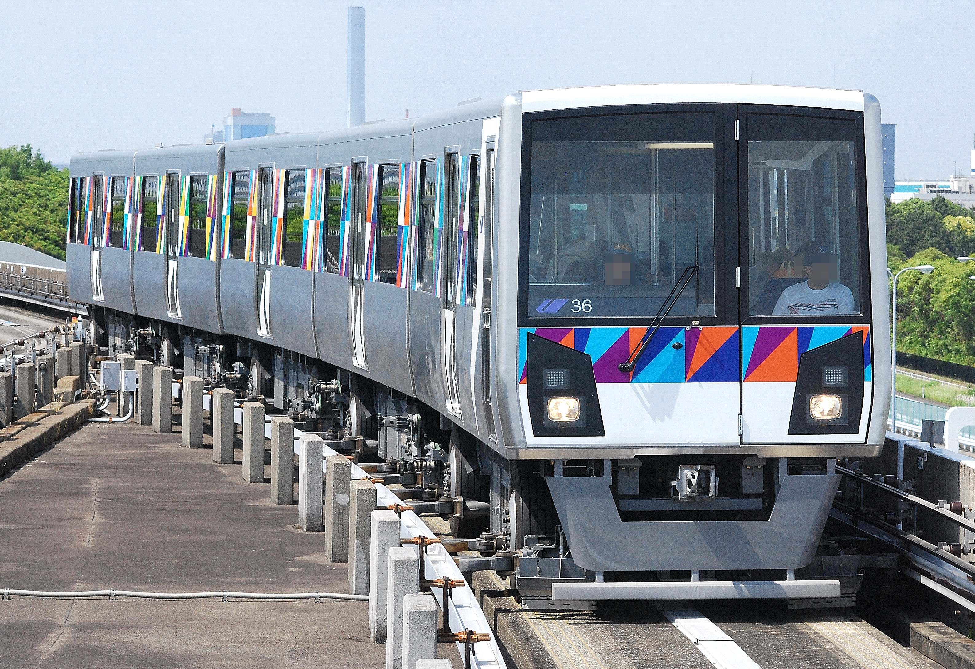 横浜新都市交通2000形（並木中央駅ホームから撮影）